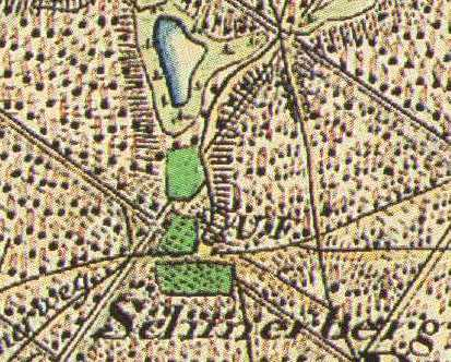 Wohnplatz Schmerberg, Ferch, Gem. Schwielowsee, Brandenburg, Deutschland, Urmesstischblatt Blatt Werder (Havel), 3643, von 1839